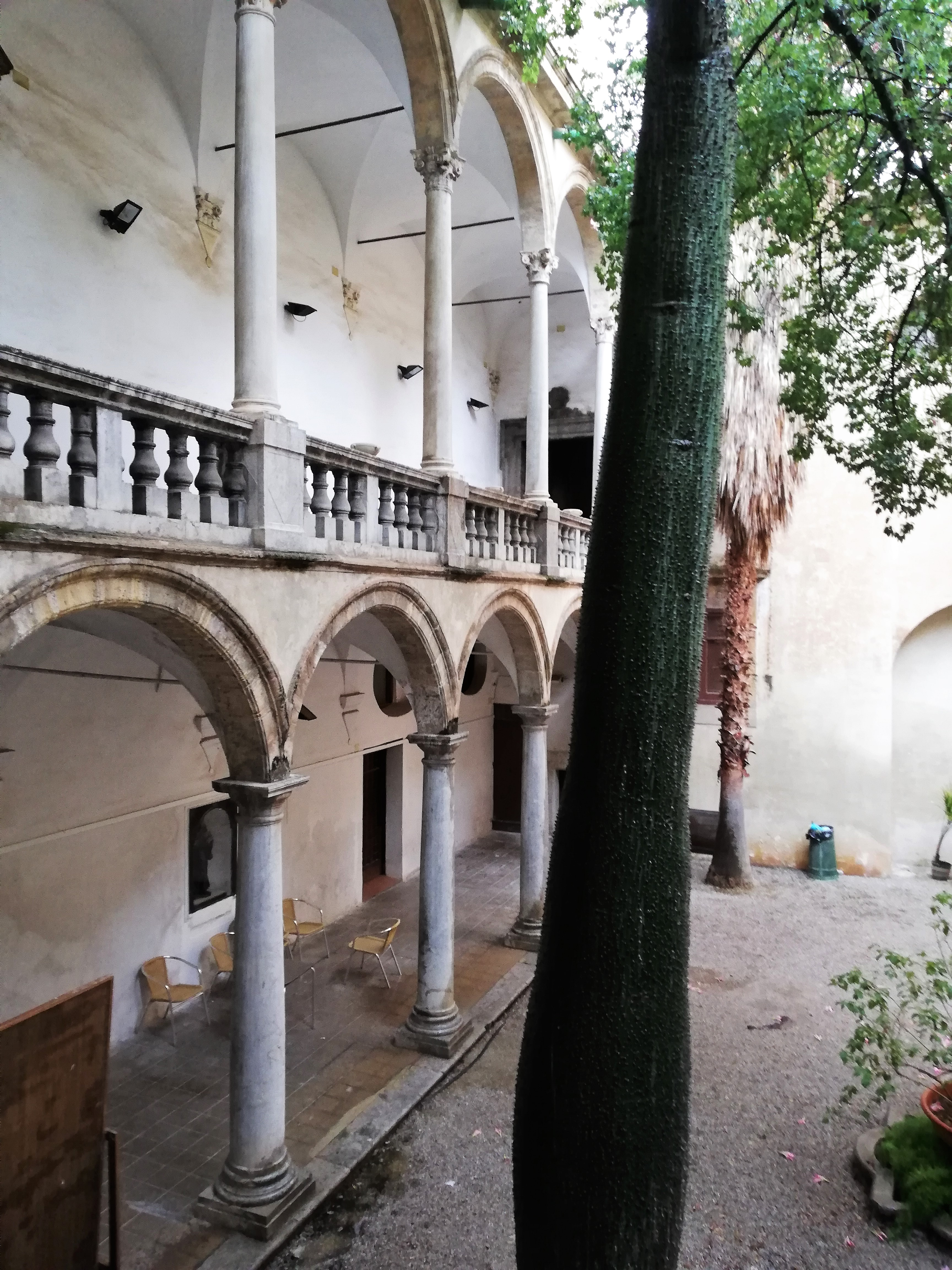 Portici chiostro